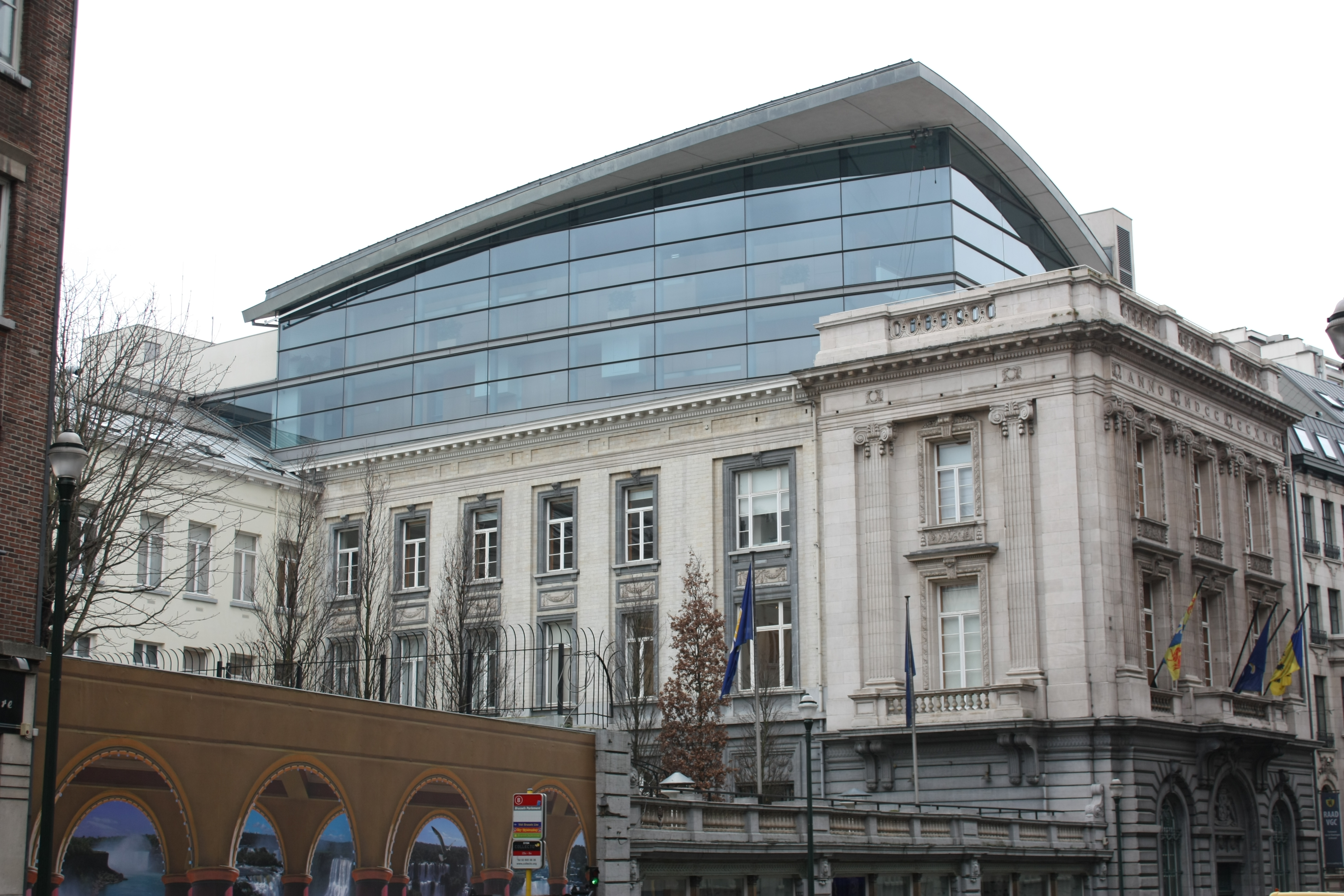 Parlement de la région de Bruxelles-Capitale, situé à Bruxelles, Belgique.